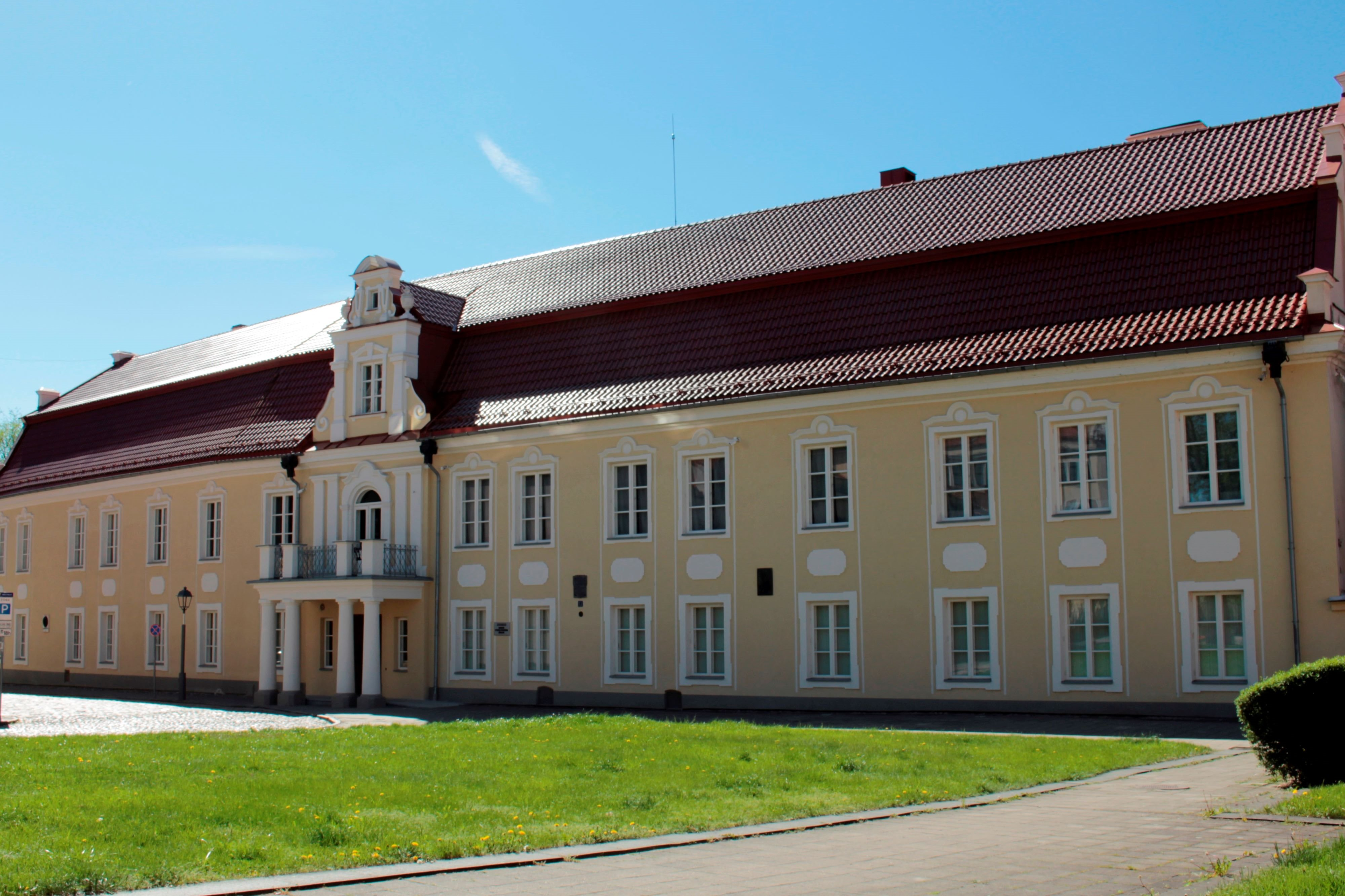 Siručio rūmai